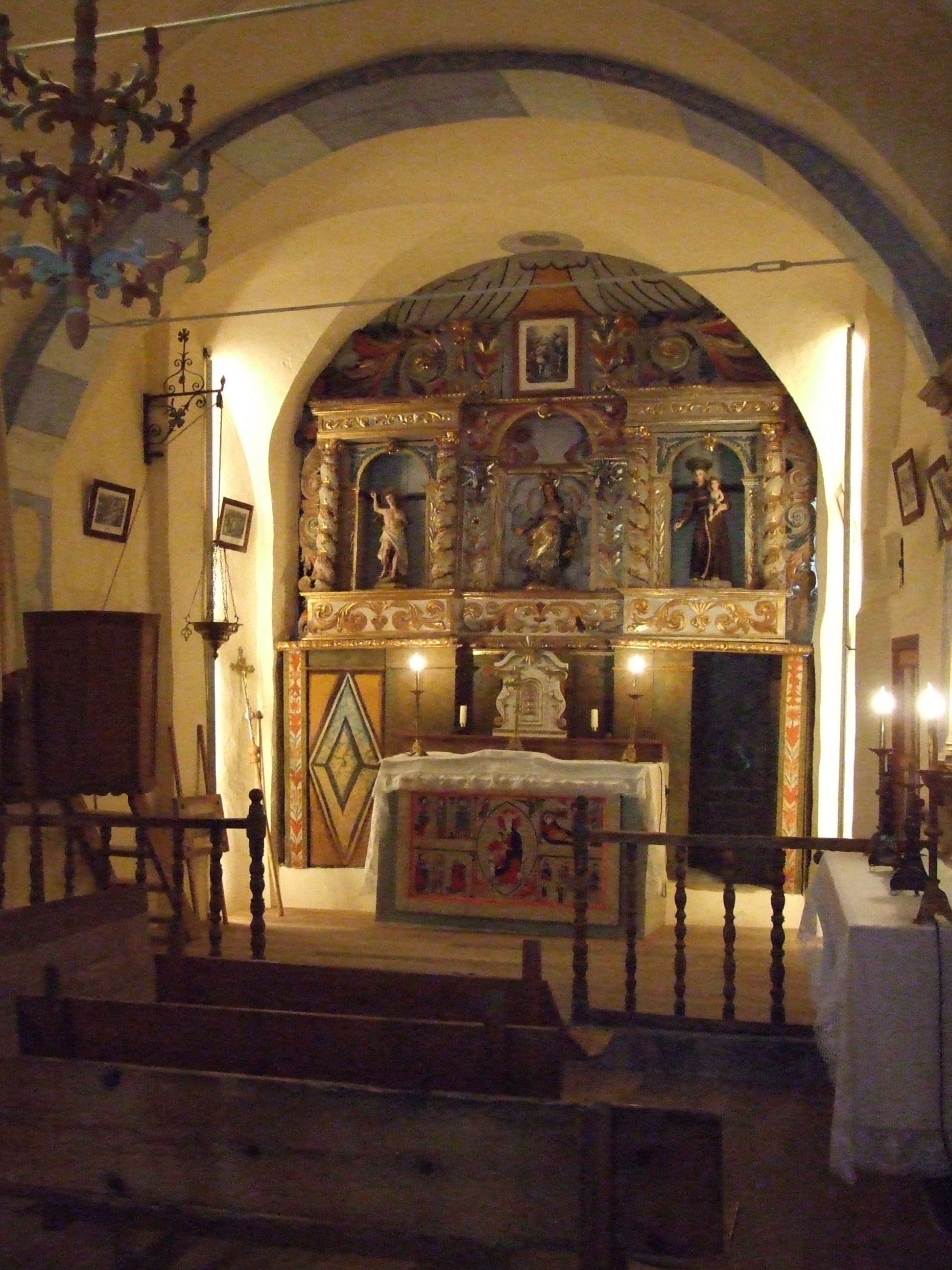 Retaule barroc de Santa Maria de Cardet (Barruera, Vall de Boí, Alta Ribagorça)